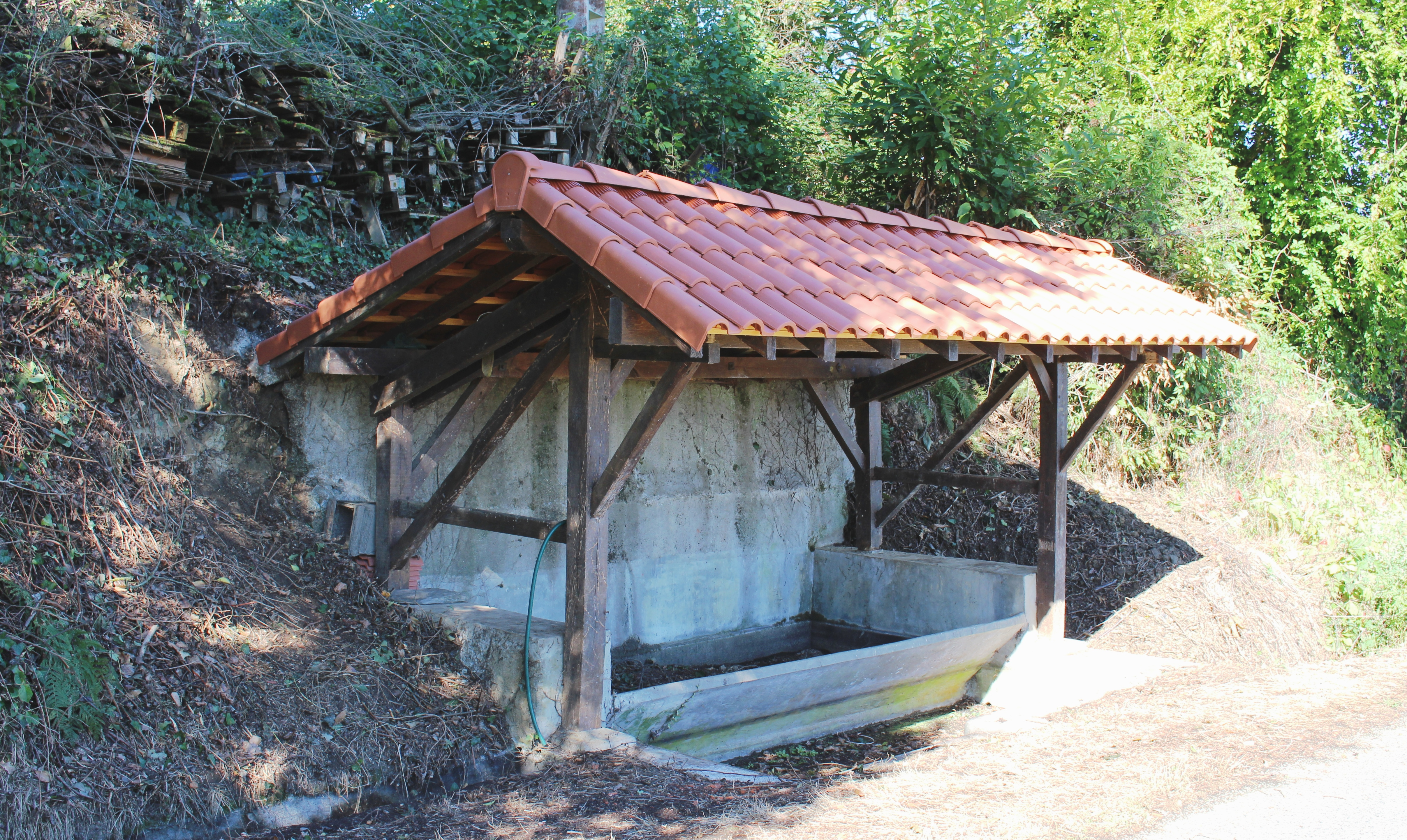 Lavoir de Buzon (Hautes-Pyrénées)